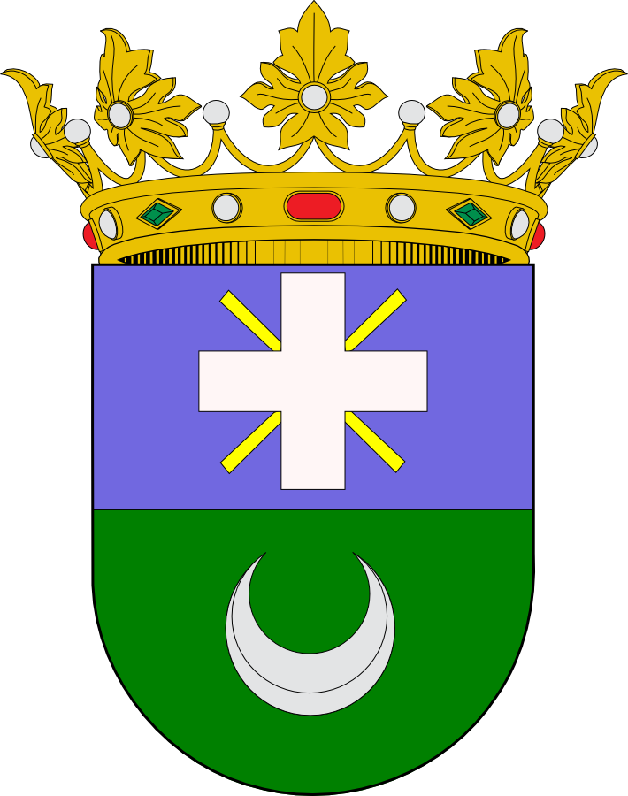 Escudo de Sedaví